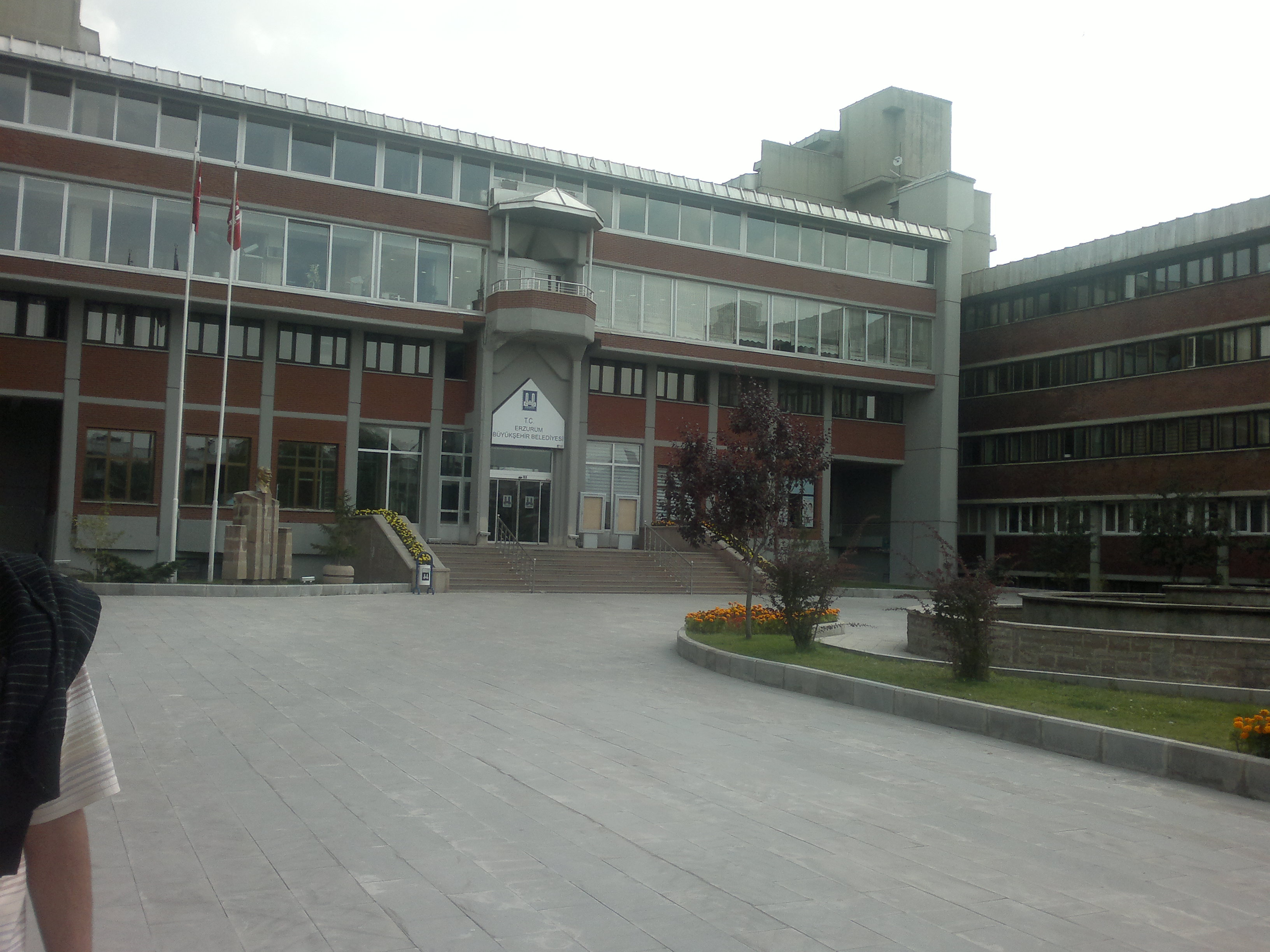 Erzurum Büyükşehir Belediyesi hizmet binası.